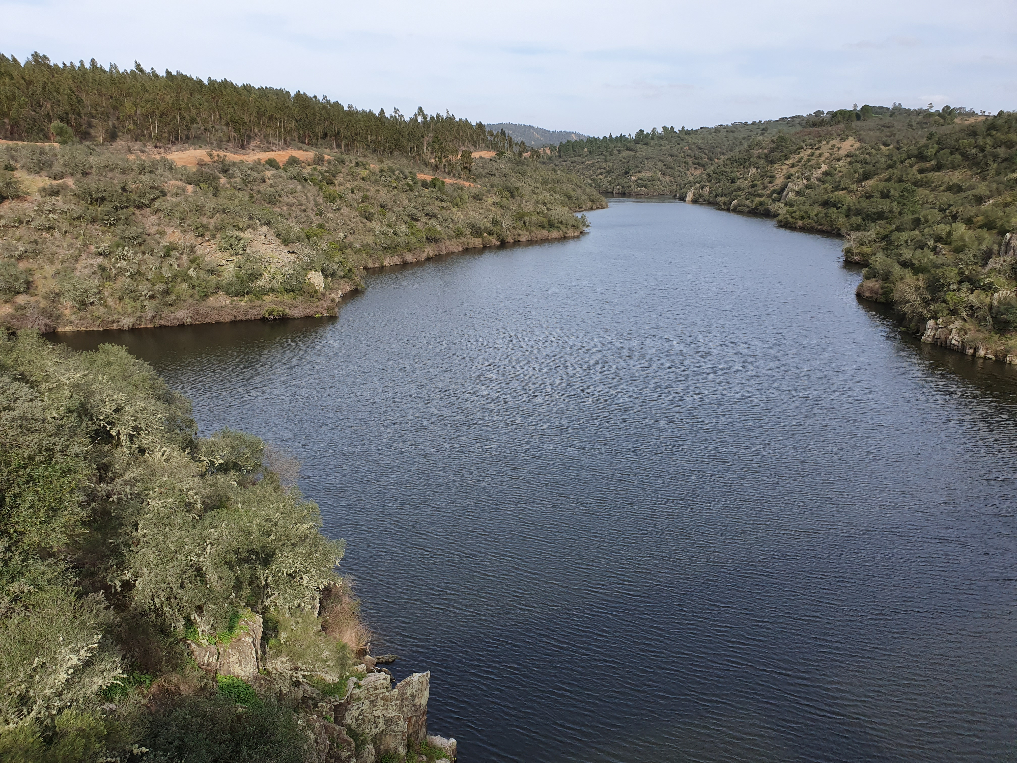 Parque Natural do Tejo Internacional - Rio Pônsul junto da Ponte dos Lentiscais